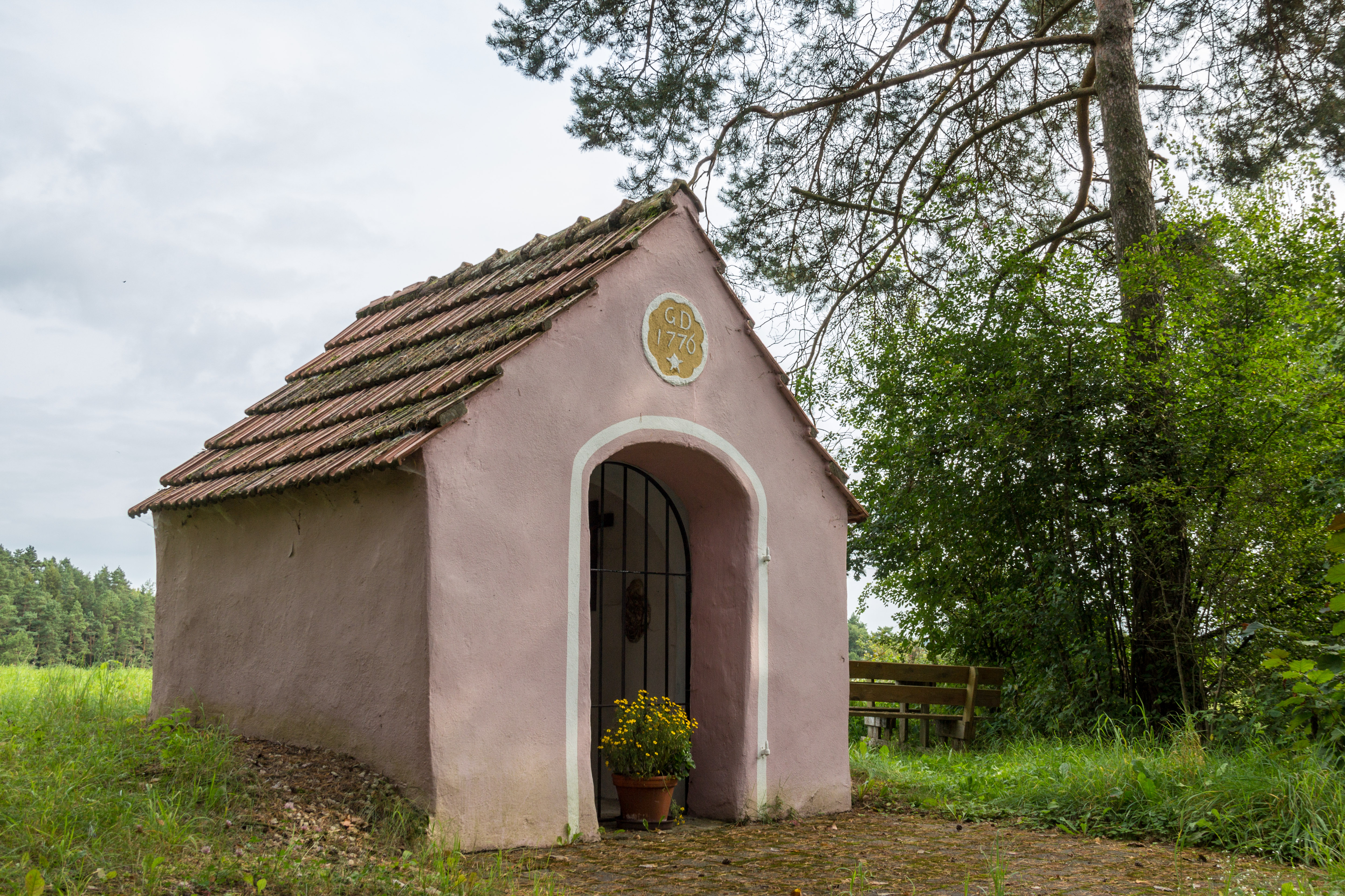 Sogenannte Nagelschmiedkapelle, kleiner Satteldachbau mit Kreuzgratgewölbe und Altarnische, bezeichnet „1776“This is a photograph of an architectural monument.